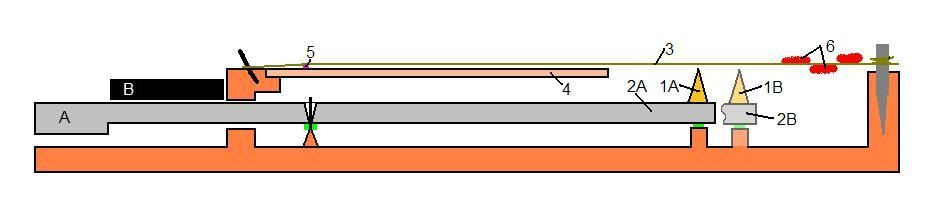 Funktion des gebundenen Clavichord